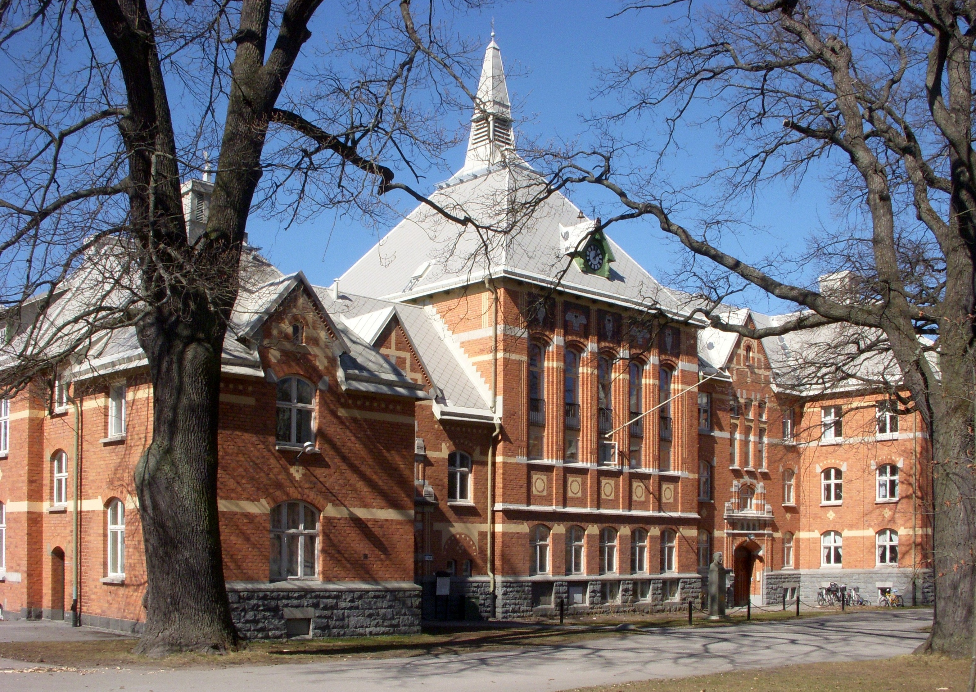 Byggnad för f.d. Veterinärhögskolan i Kräftriket ritad av Ludwig Peterson